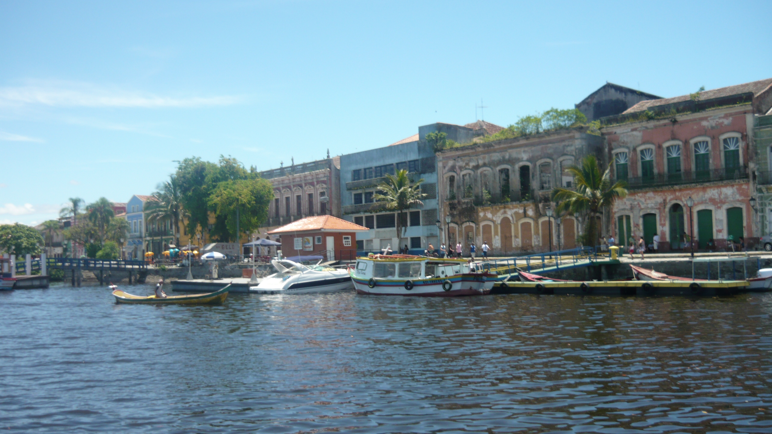 Centro Histórico-Pguá-Pr-J.A